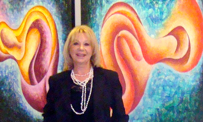 Adriana Zapisek en la inauguración de su exhibición "Entre dos mundos"